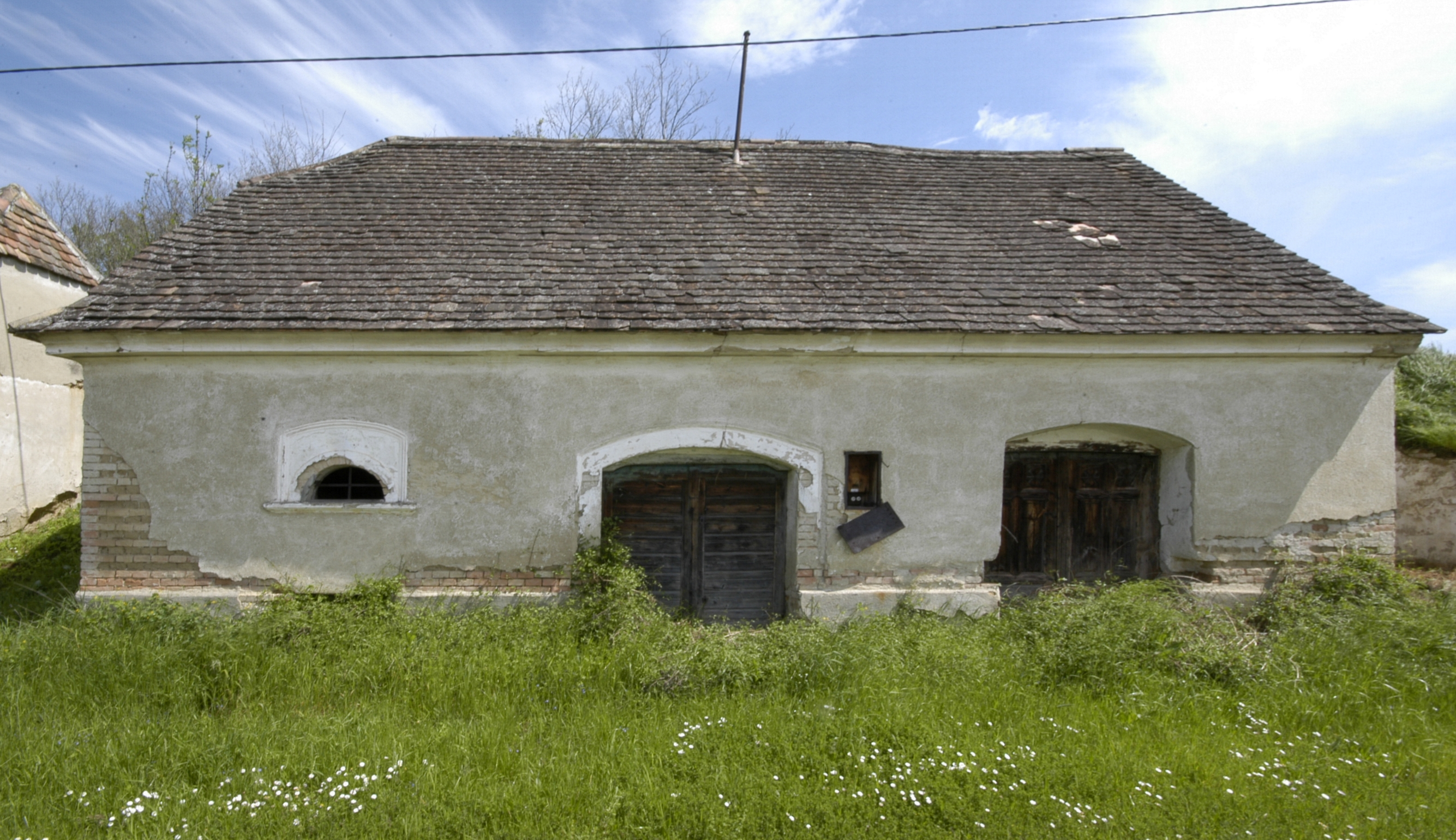 Objekt in der Mühlkellergasse in Frauendorf an der Schmida